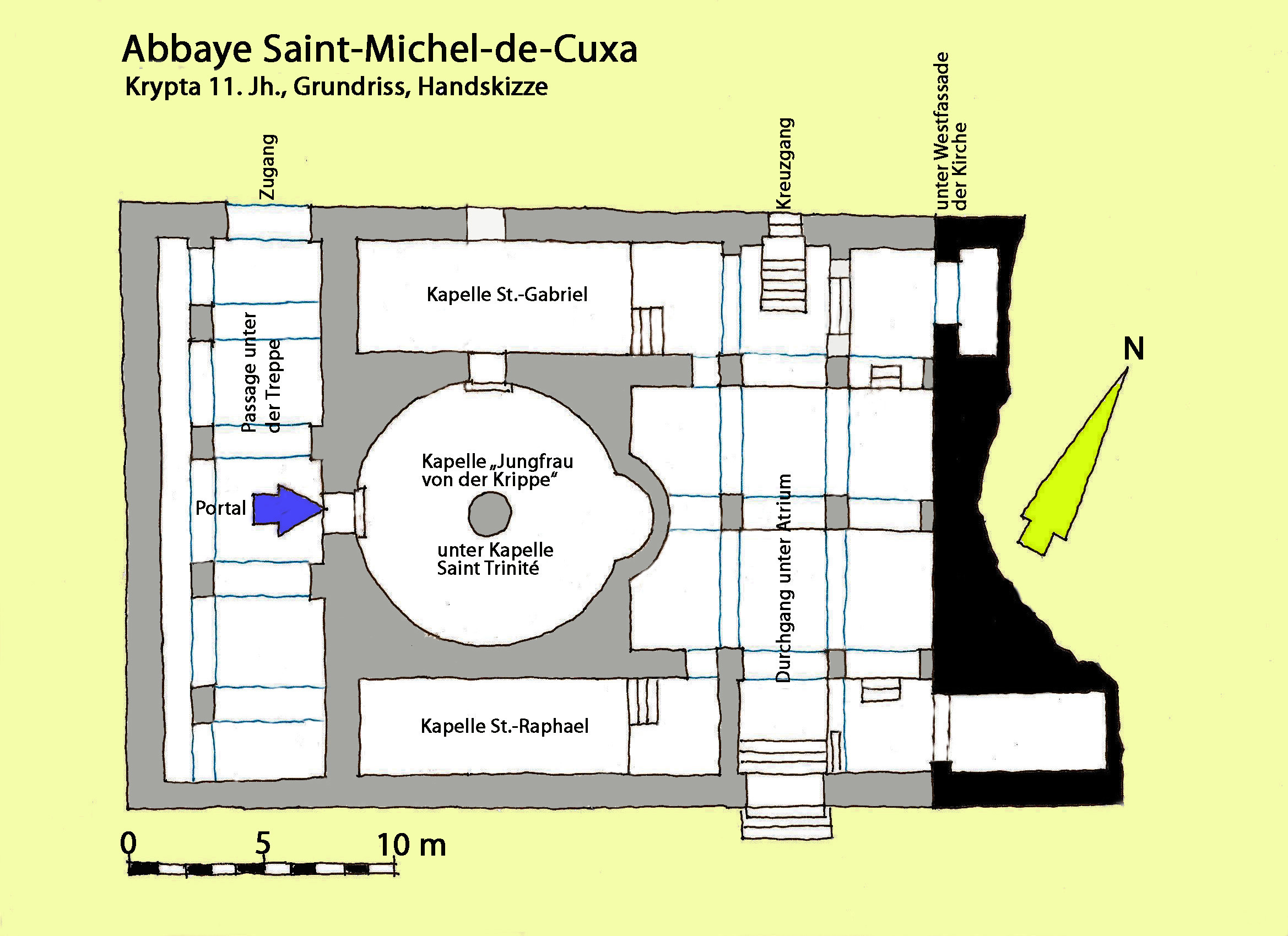 Abbaye Saint-Michel-de-Cuxa, Krypta, Grundriss, Handskizze